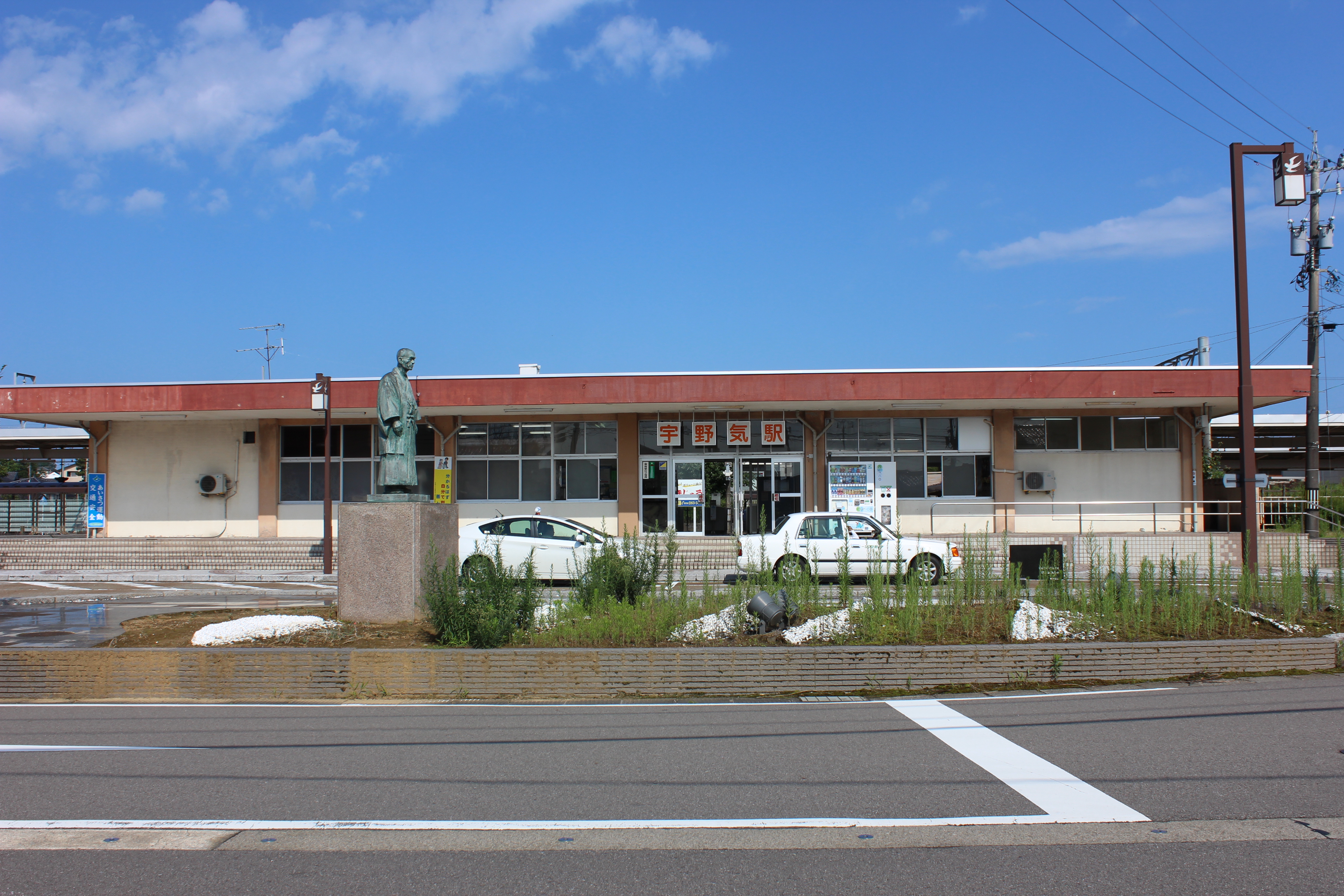 宇野気駅（石川県かほく市） Canon EOS Kiss X5